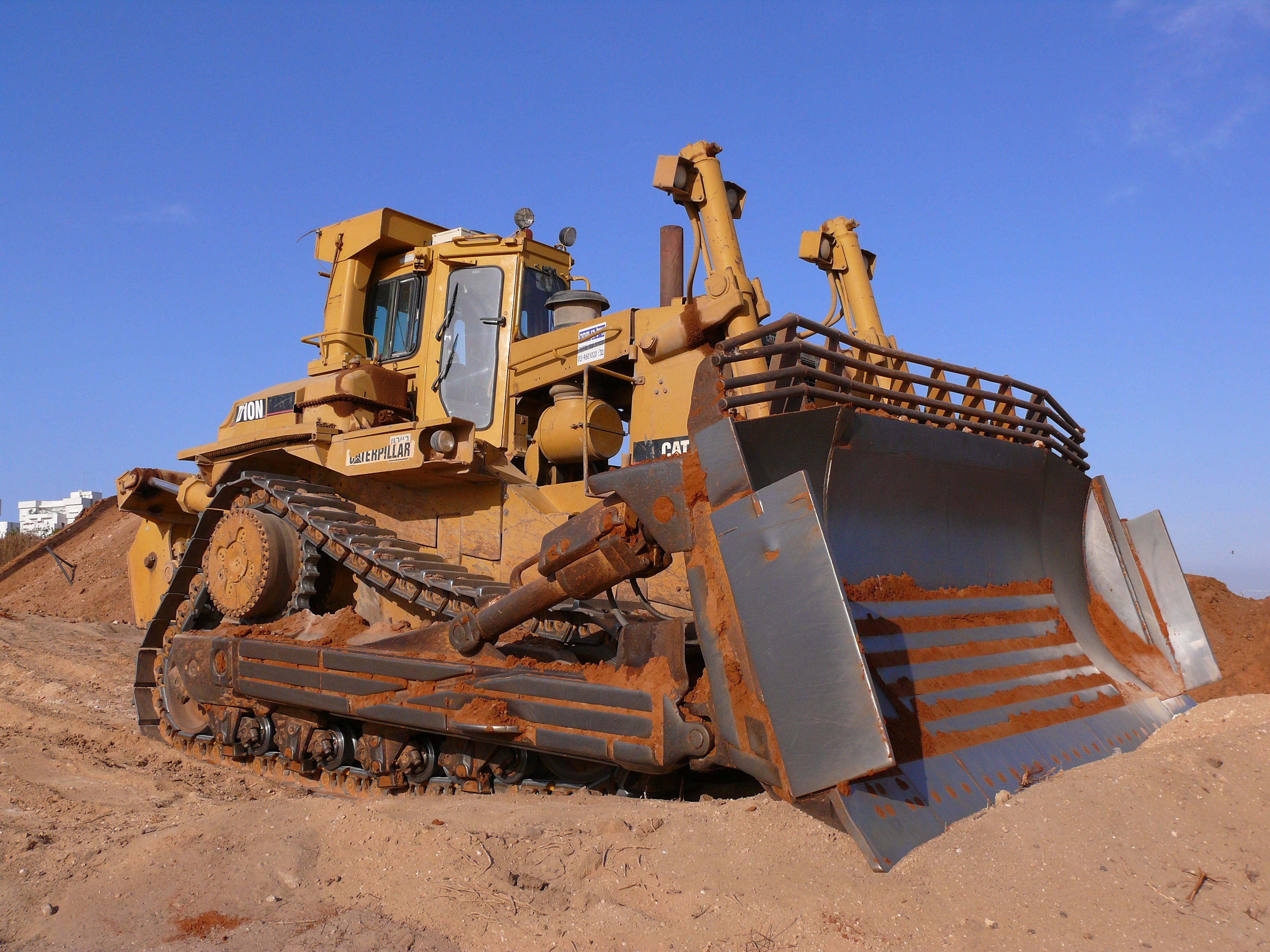 Caterpillar D10N bulldozer